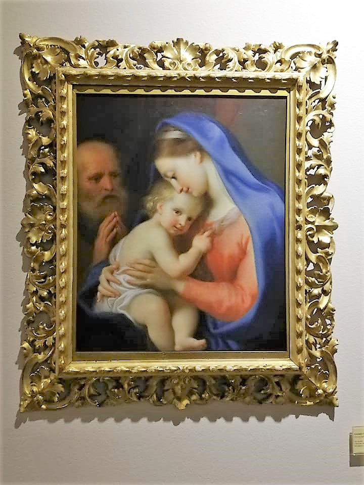 Sacra Famiglia, olio su tela commissione del monaco De Leyva per la chiesa di San Nicolò l'Arena, opera Antonio Cavallucci.